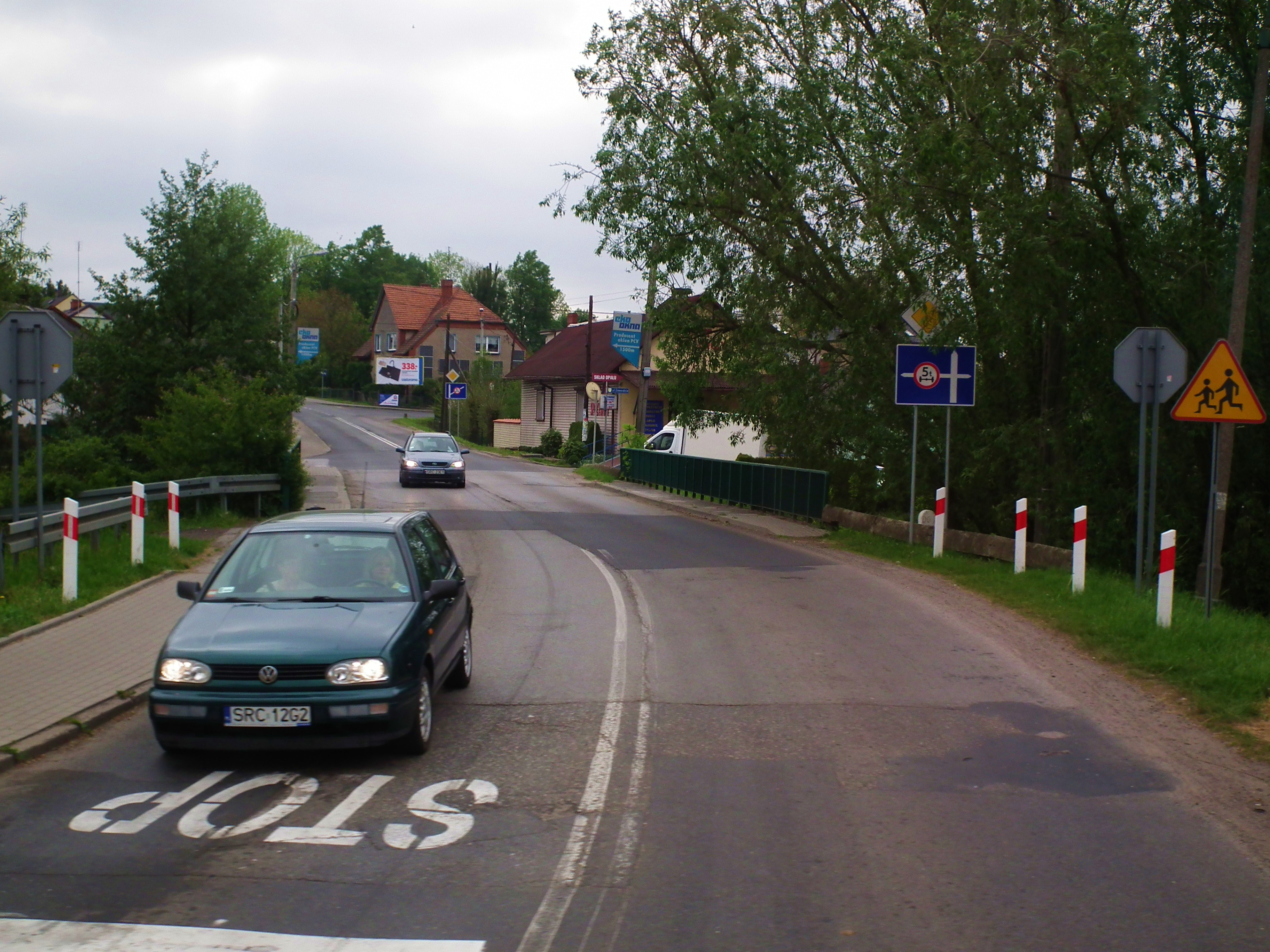 Centralna ulica Pietrowic Wielkich.